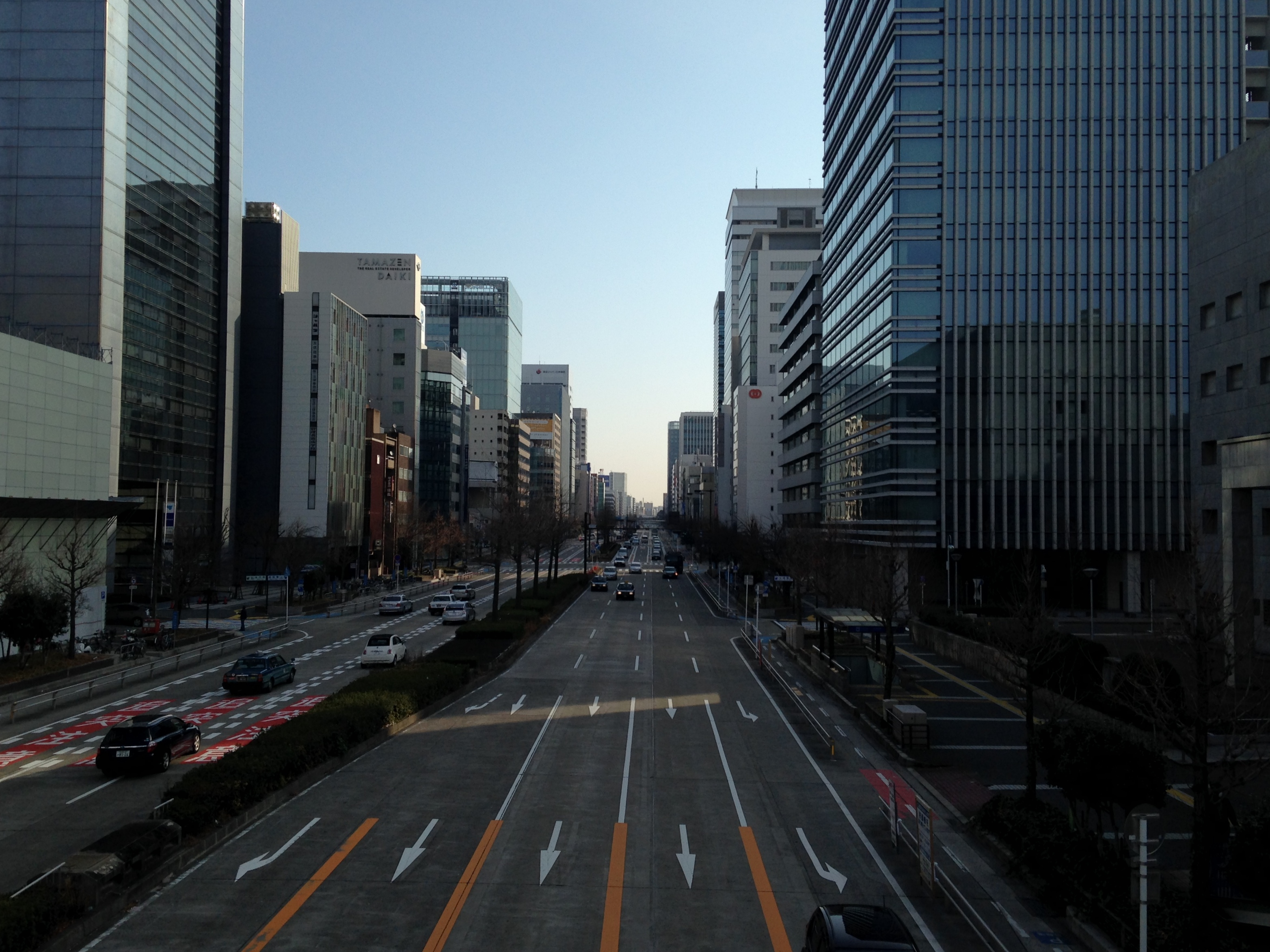 日銀前交差点より望む桜通(栄方面)